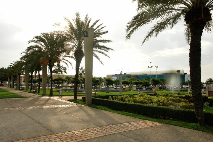 Venezuela